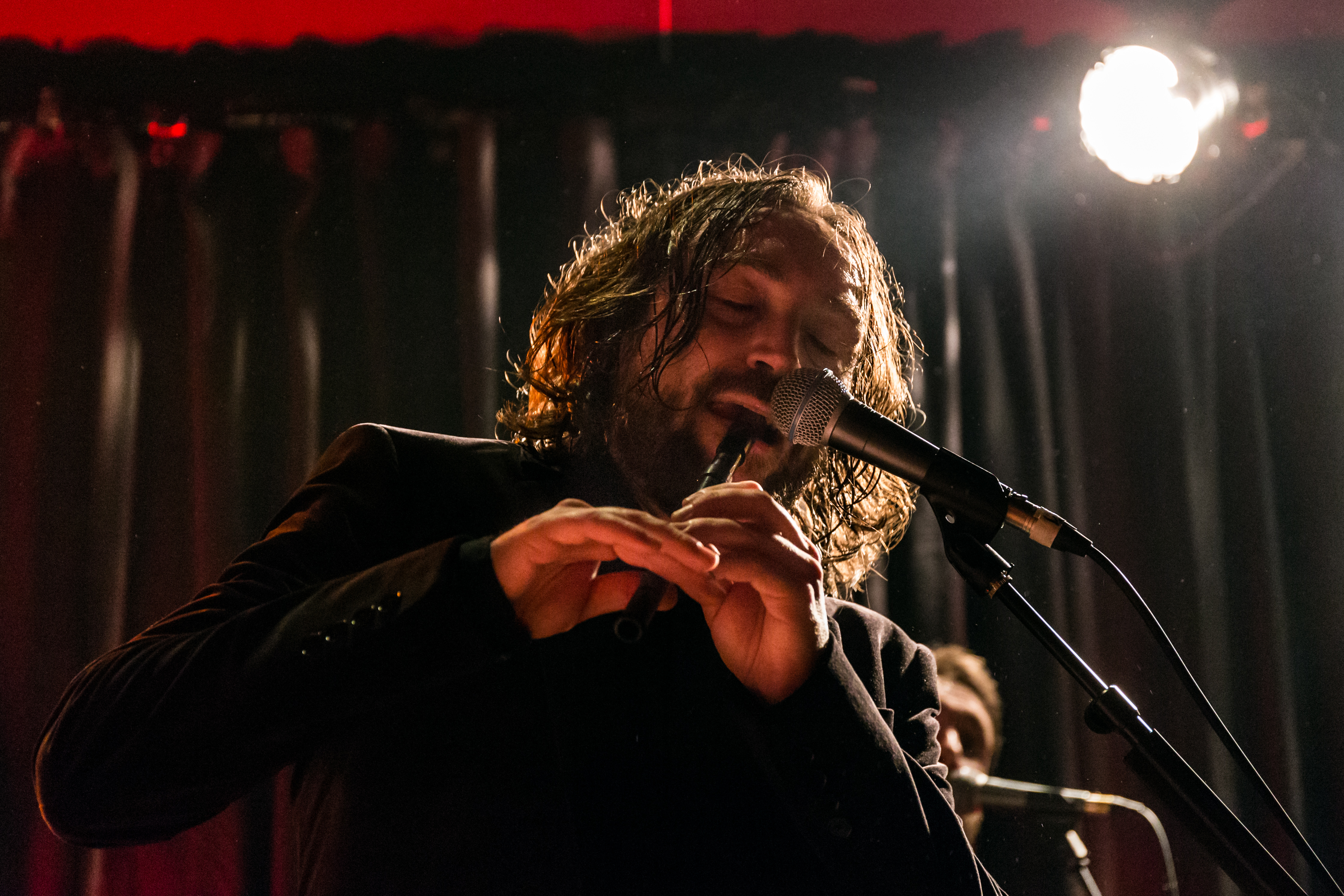 Matmatah en concert au bar Le P'tit minou au port de Brest le 17 février 2017.